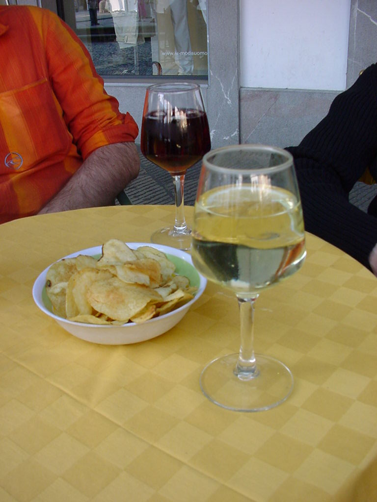 Spritz_rosso_e_bianco, ricetta originaria vino + acqua frizzante autore utente:DracoRoboter self made